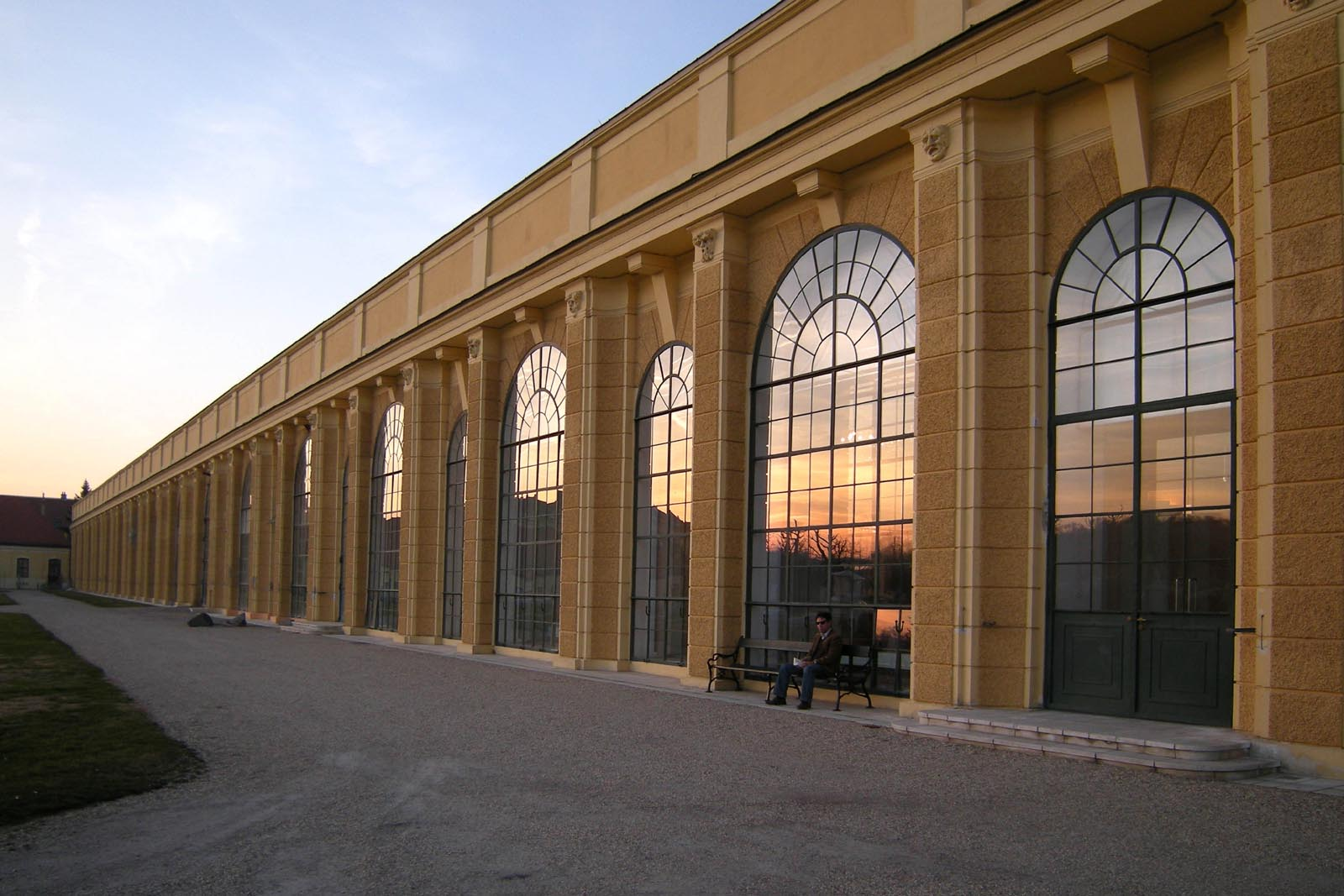 Schönbrunn Orangery in orange ;)